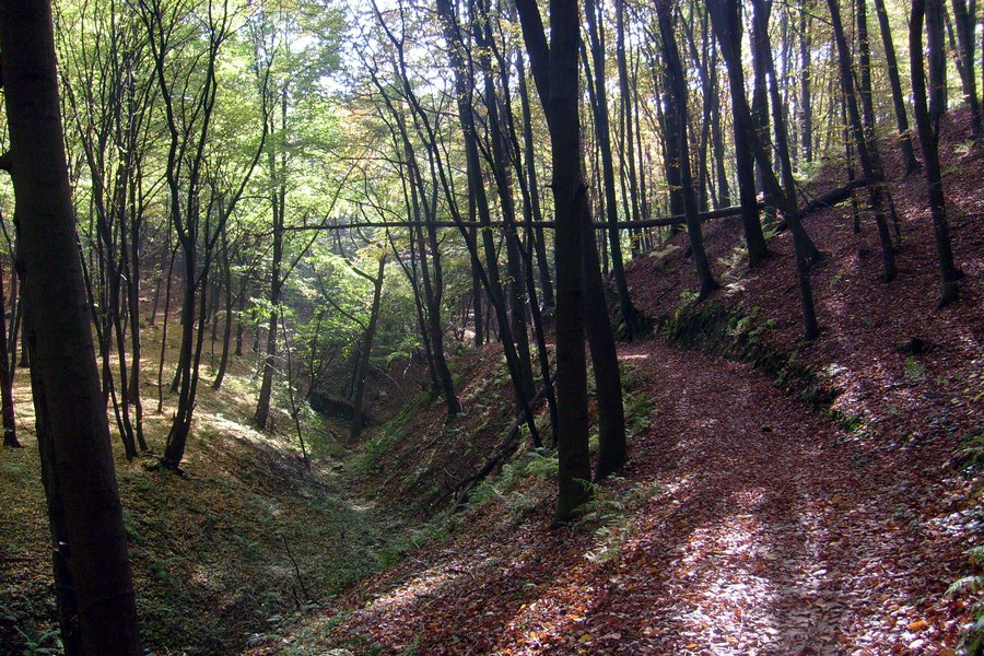 Wąwóz Półrzeczki na Jurze Krakowsko-częstochowskiej.